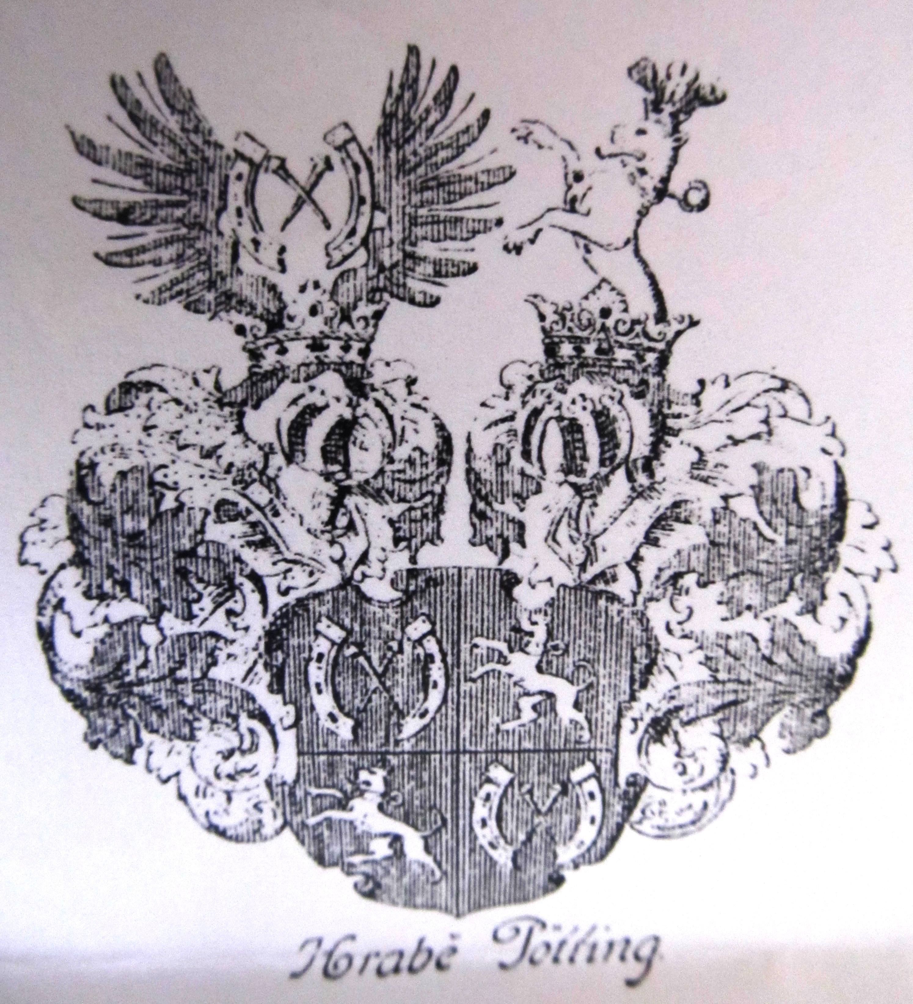 Erb Pötting-Persing